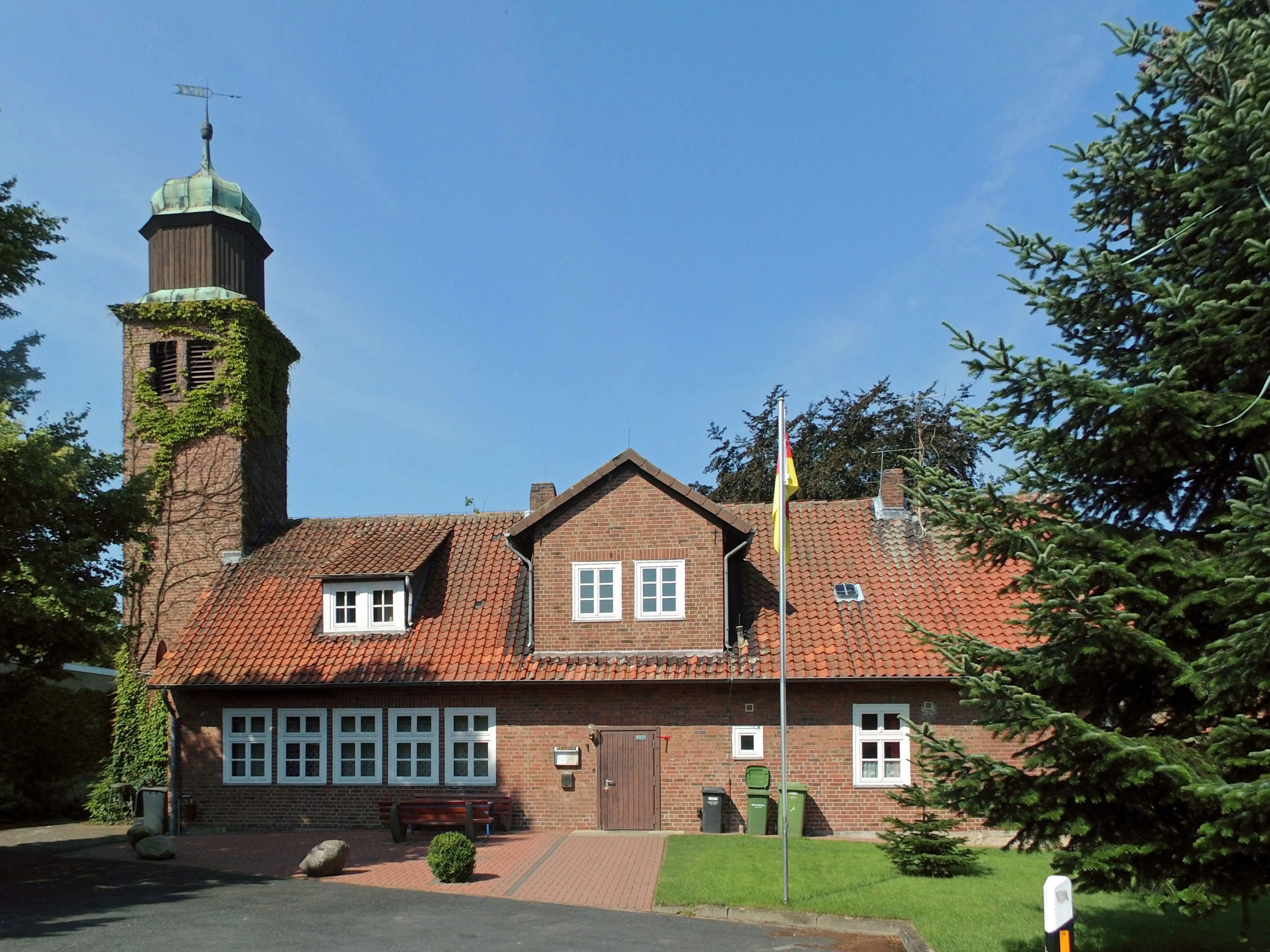 Ehemalige Schule im Wolfsburger Ortsteil Velstove